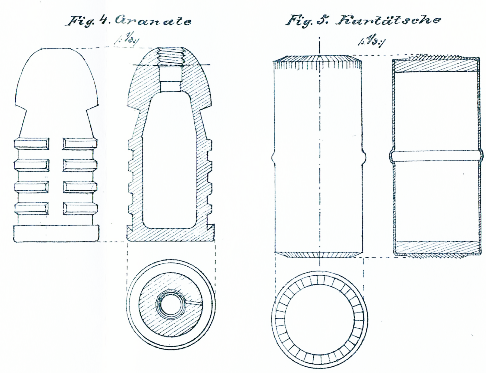 8cm / 9cm Bleihemdgranate, Kartätsche